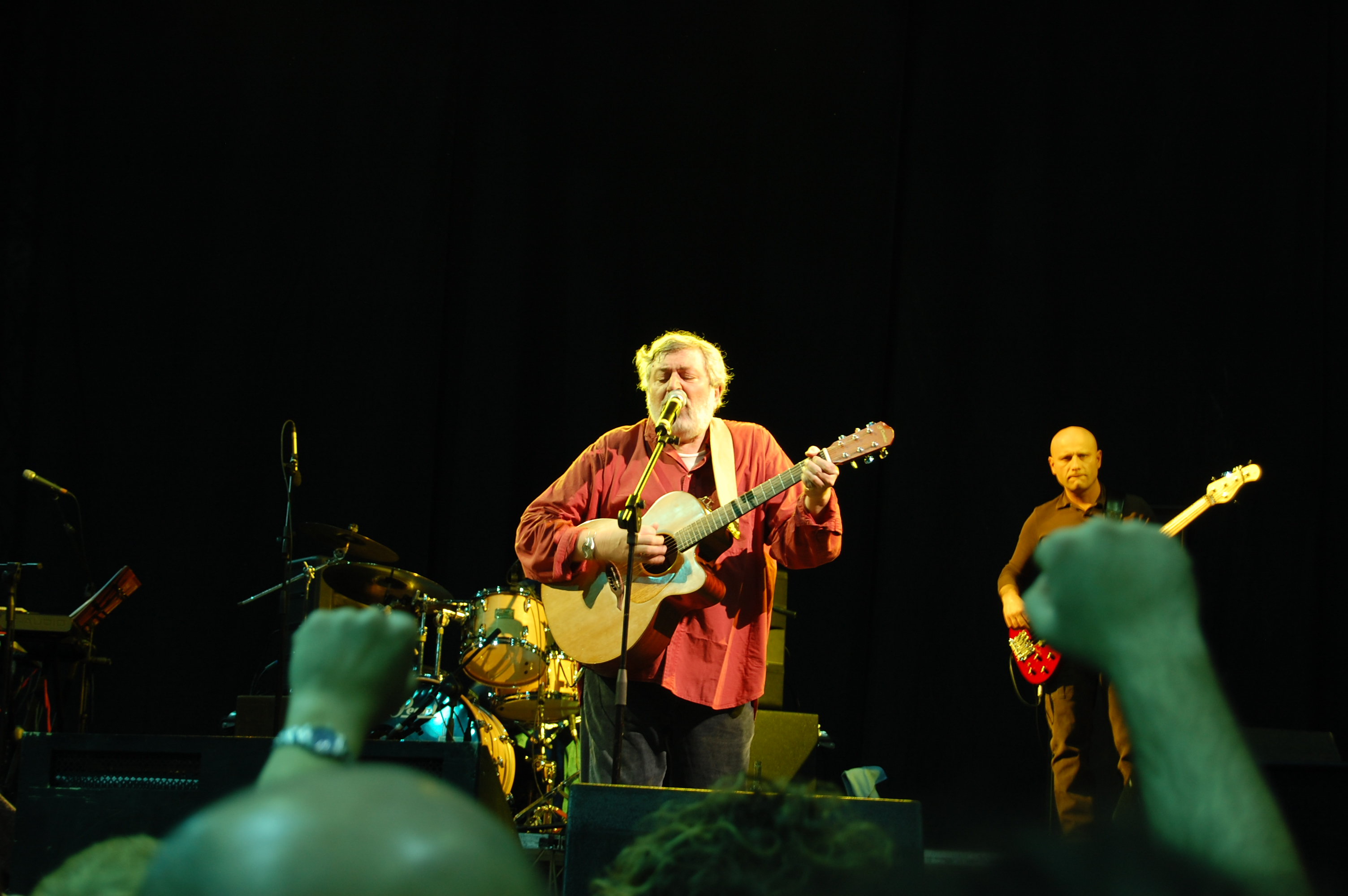 Francesco Guccini in concerto al Palabanca di Piacenza